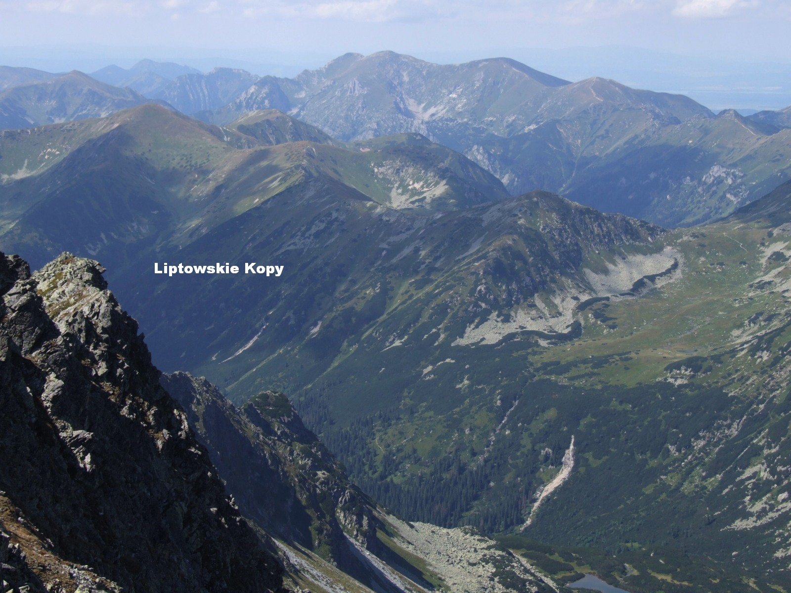 Liptowskie Kopy. Widok z Koprowego Wierchu